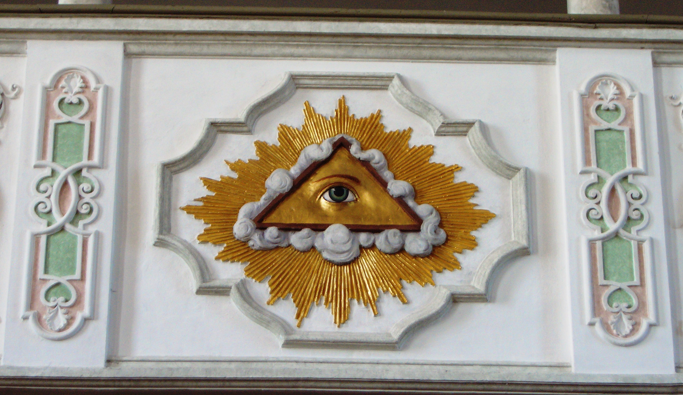 Pfarrkirche Mariä Verkündigung, Fuchstal, Germany, Auge der Vorsehung auf der Empore